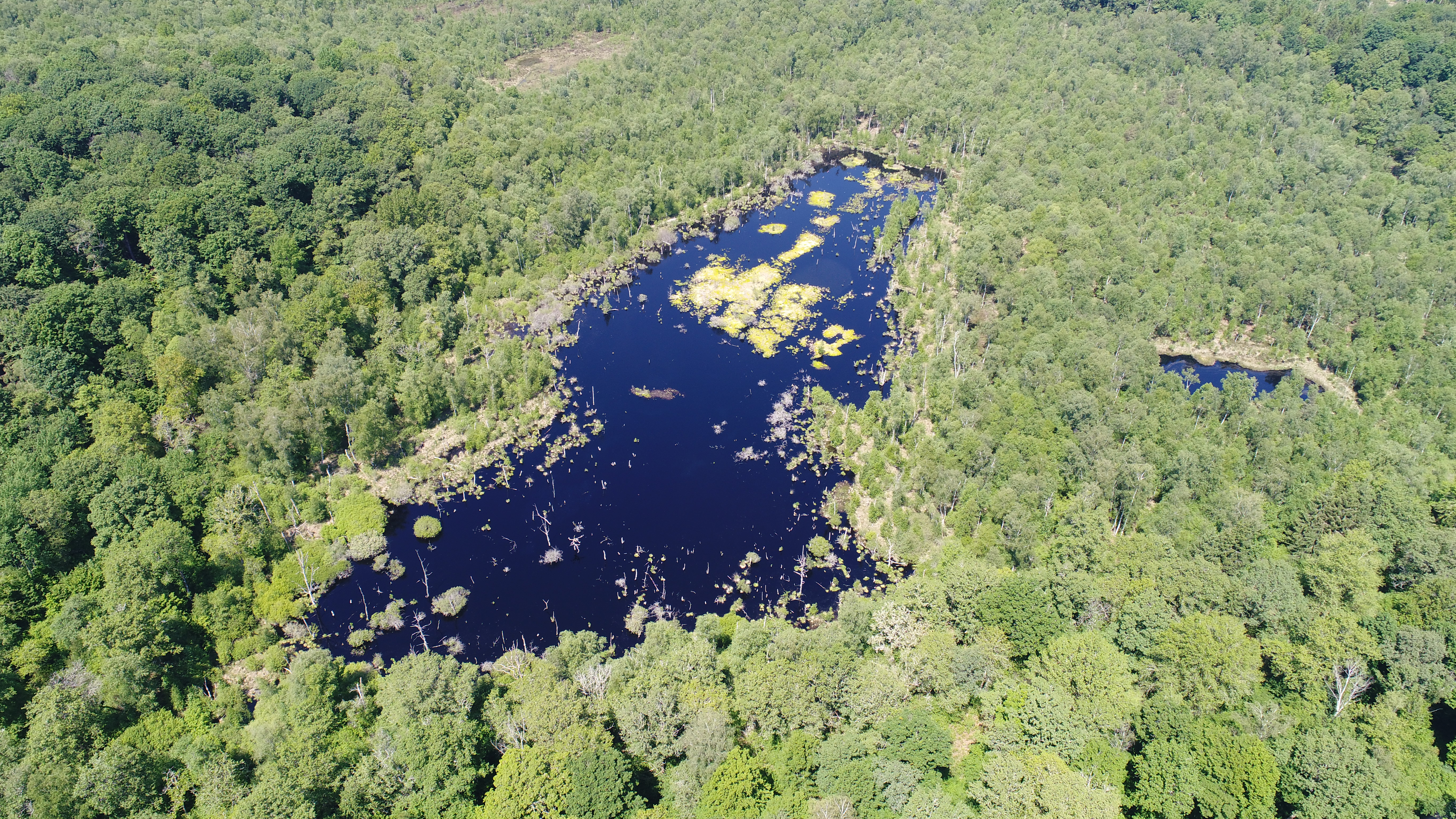 La Tourbière de la Grande Pile à Saint-Germain en Haute-Saône (70).